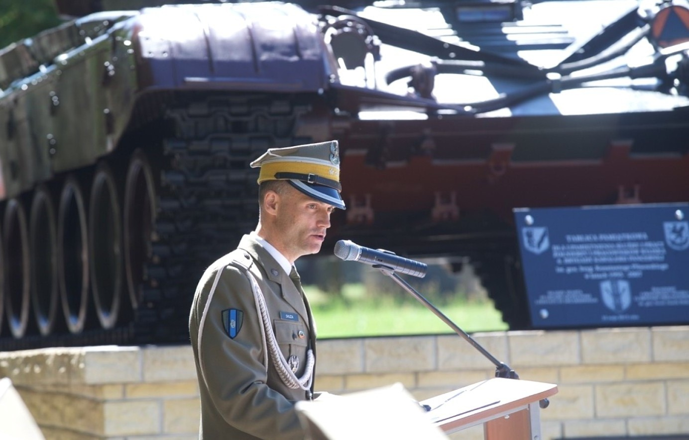 Ppłk Paweł Skuza